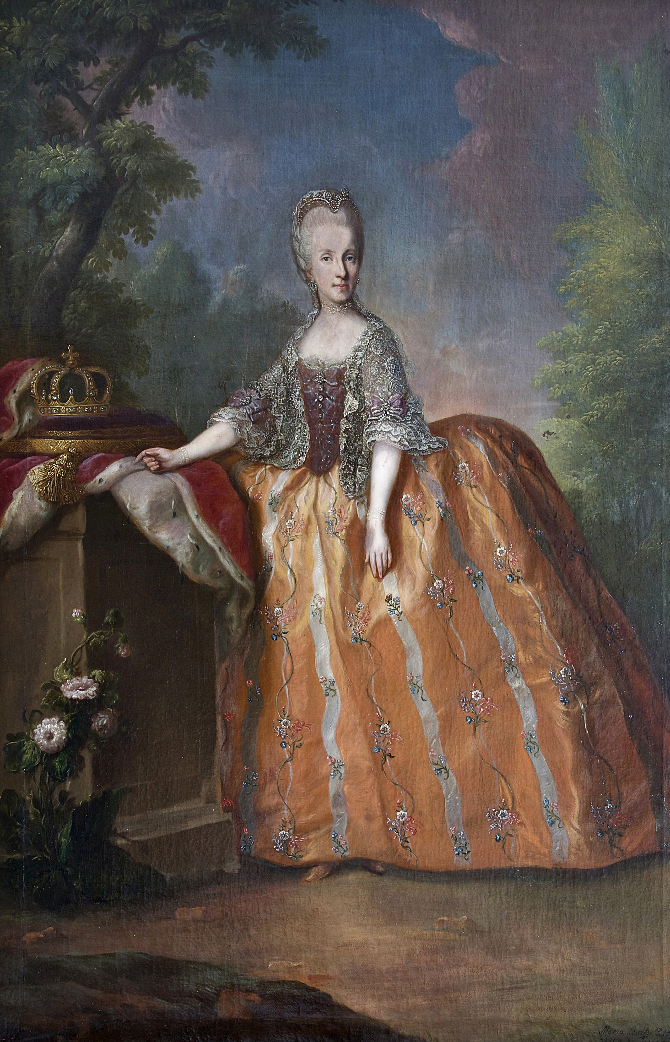 Portrait en pied de Marie-Louise d'Espagne, grande duchesse de Toscane, futur Impératrice d'Autriche, épouse de Léopold II (1745-1792).